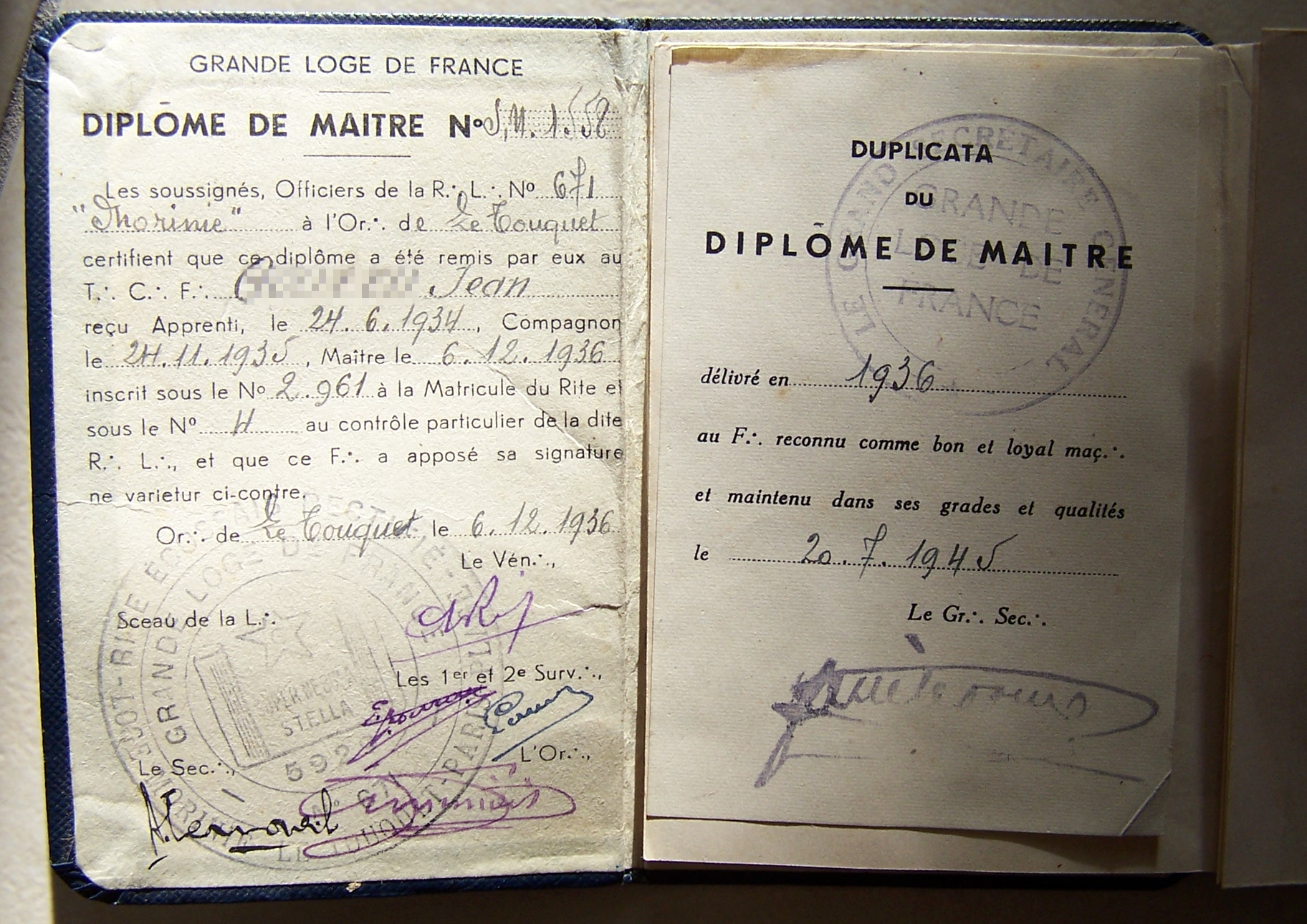 Pages de garde d'un diplôme maçonnique français de 1945, témoignant de l'épuration à l'issue de la Seconde Guerre Mondiale.